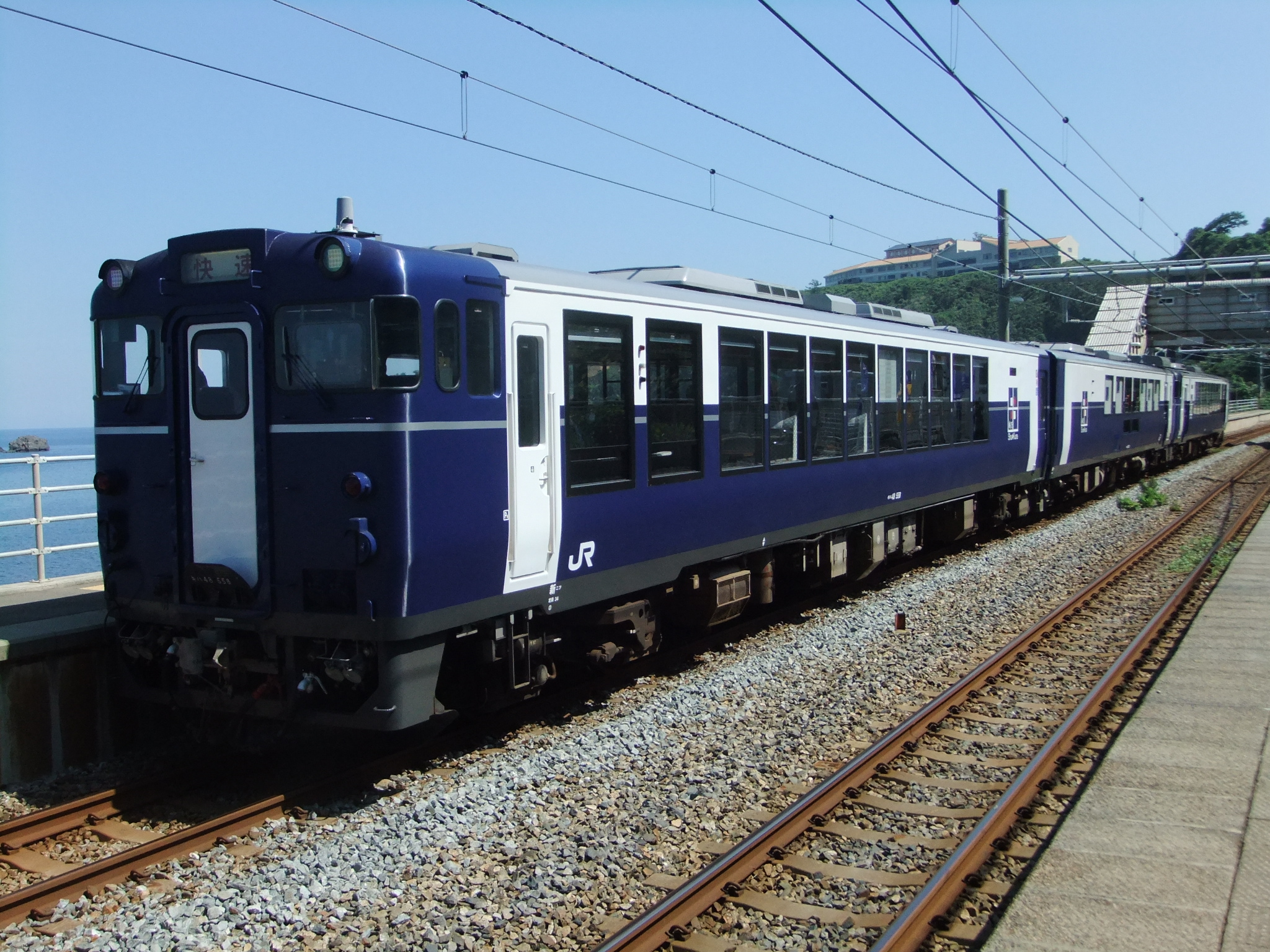 越乃Shu*Kura